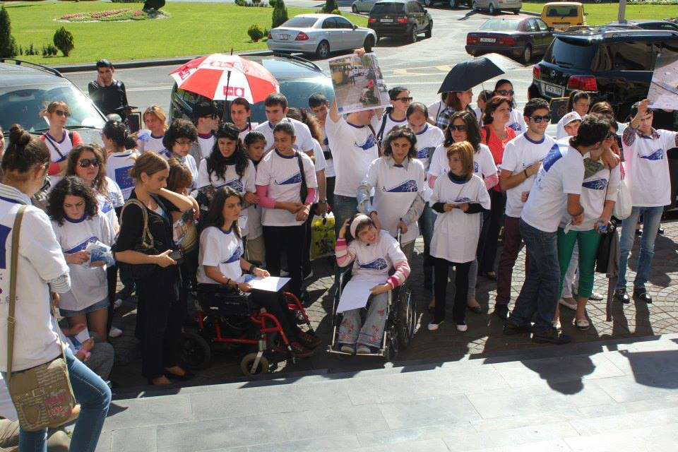 Հաշմանդամություն ունեցող քաղաքացիները, մի շարք ՀԿ-ներ «Երևանը նաև իմ քաղաքն է» ակցիայի ժամանակ